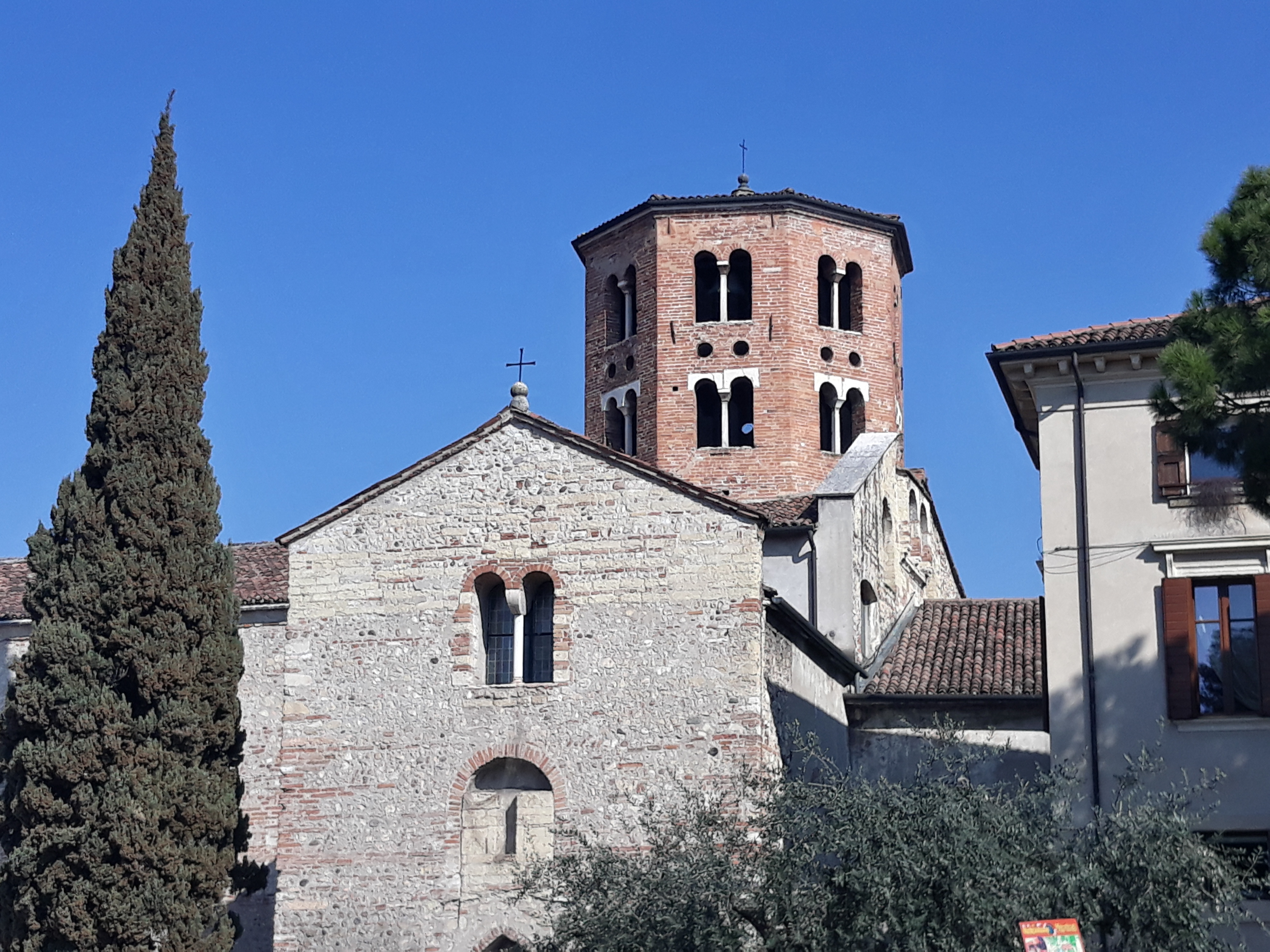 Chiesa di Santo Stefano a Verona